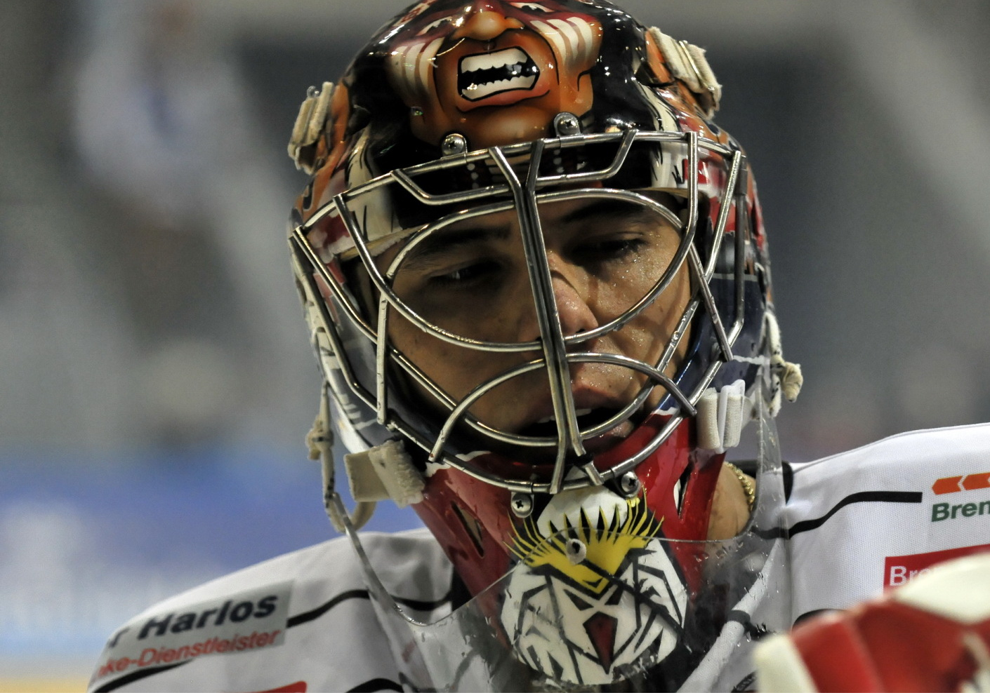 Alfie Michaud, Torhüter der Fishtown Penguins Bremerhaven